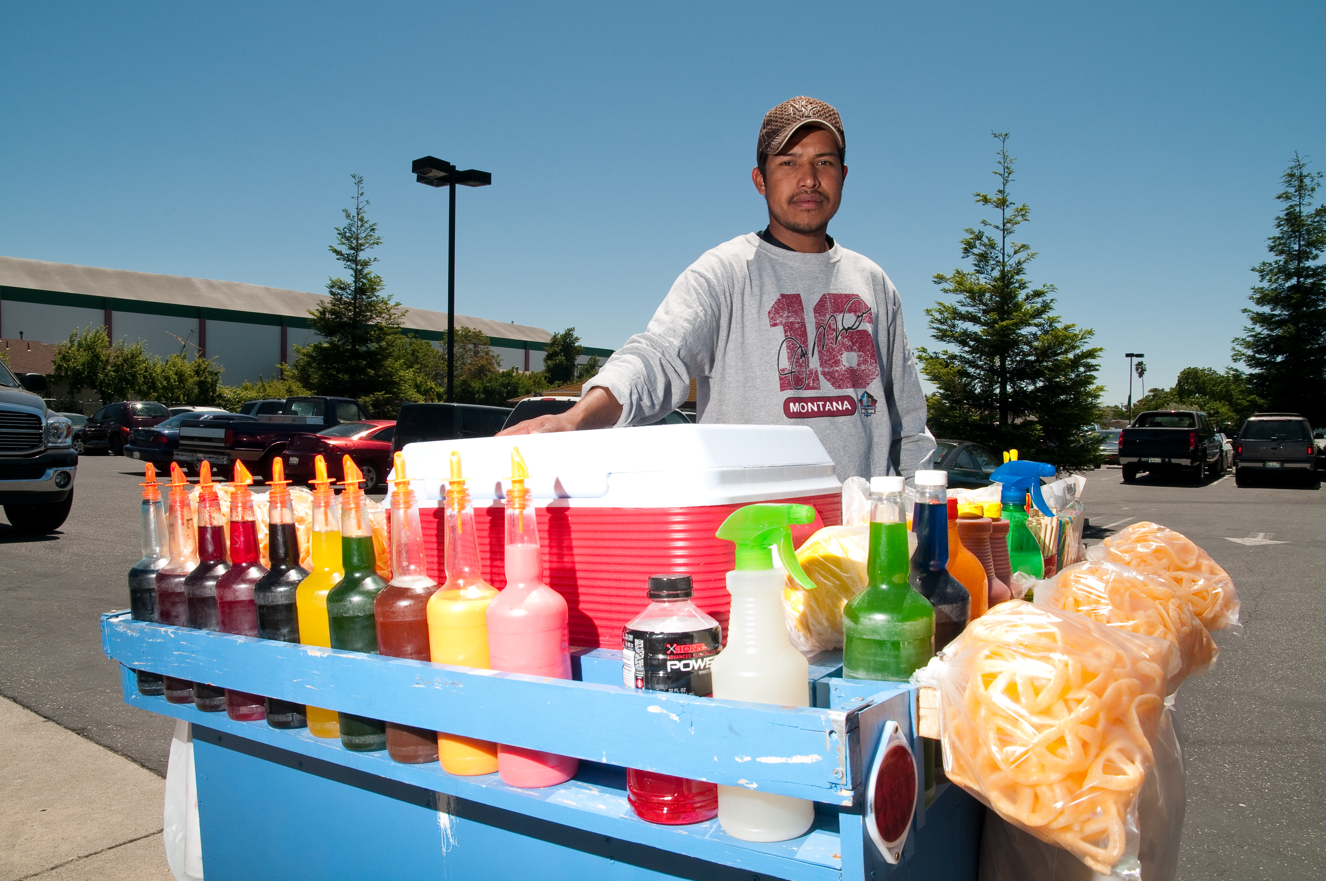 Migrante de Oaxaca. Está en aquel pueblo cerca de Sacramento porque ahí puede vivir en paz sin que lo moleste la migra. Para vivir, traslado su negocio completo a Estados Unidos. Está ahí porque: "es el dinero el que lo mantiene ahí". Nada más.